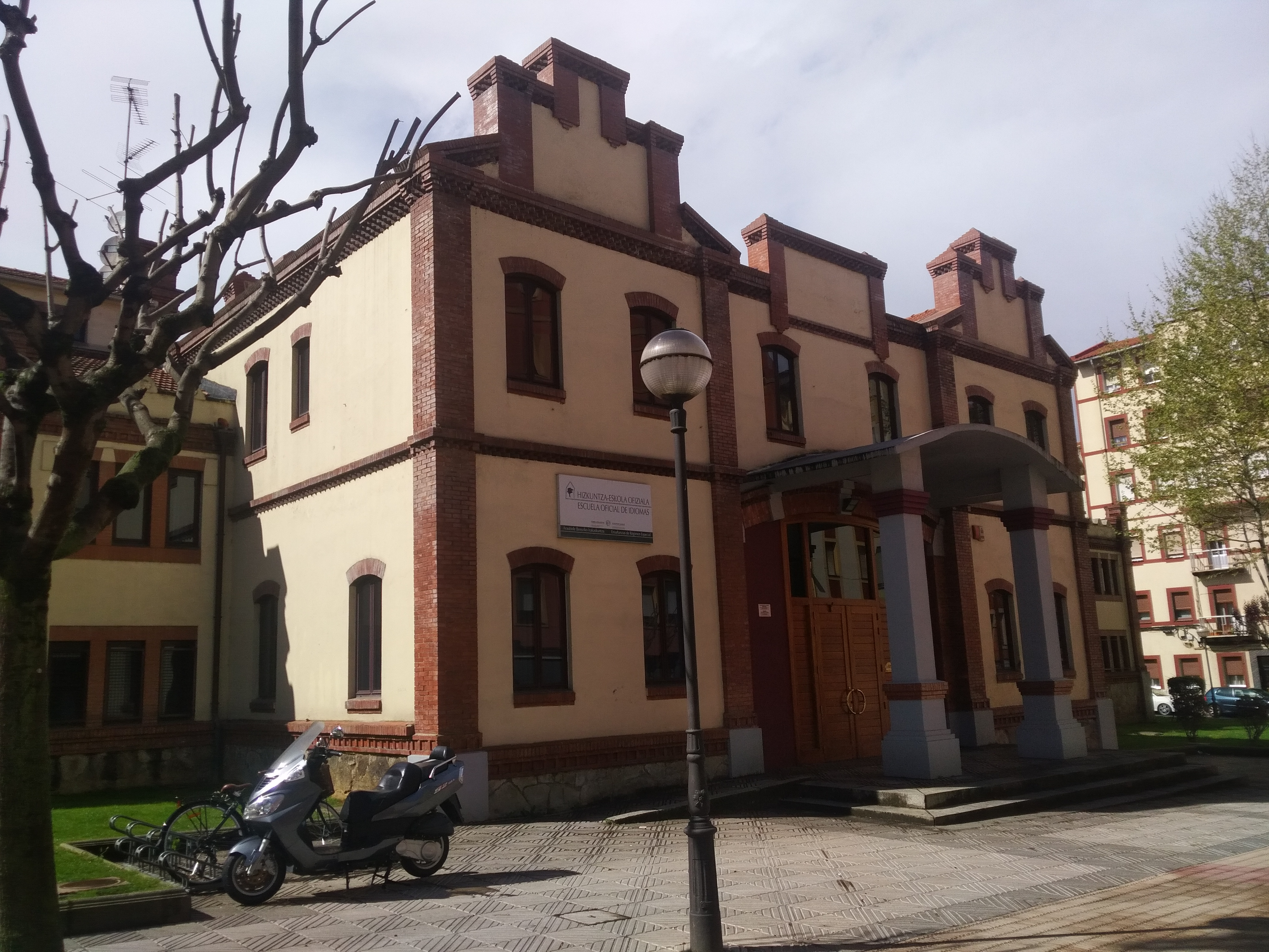 Fotografía de la entrada al edificio